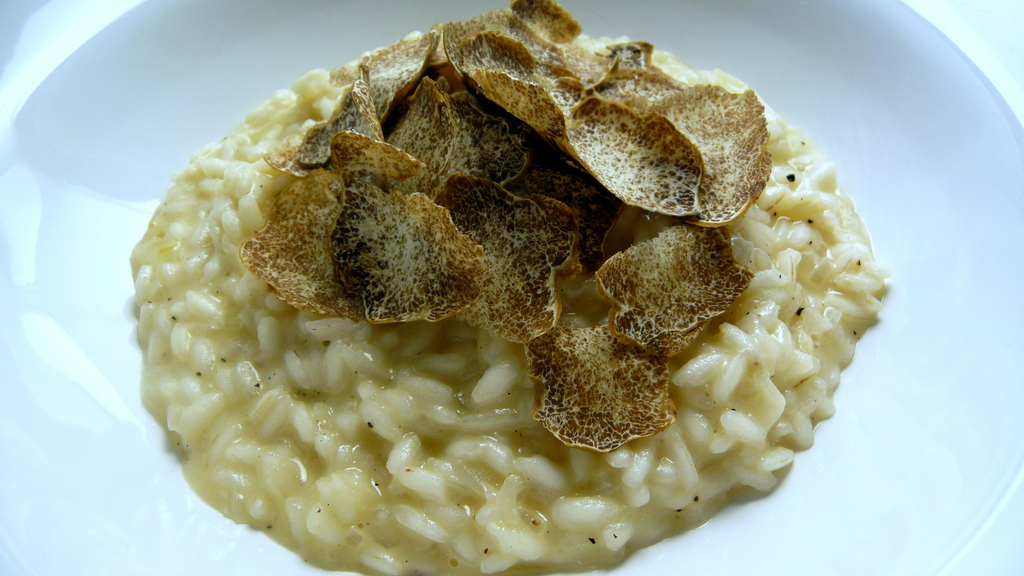 Risotto à la truffe blanche d'Alba